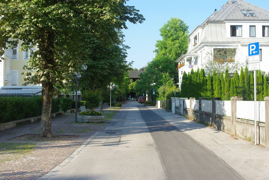 Mackstraße in 83435 Bad Reichenhall